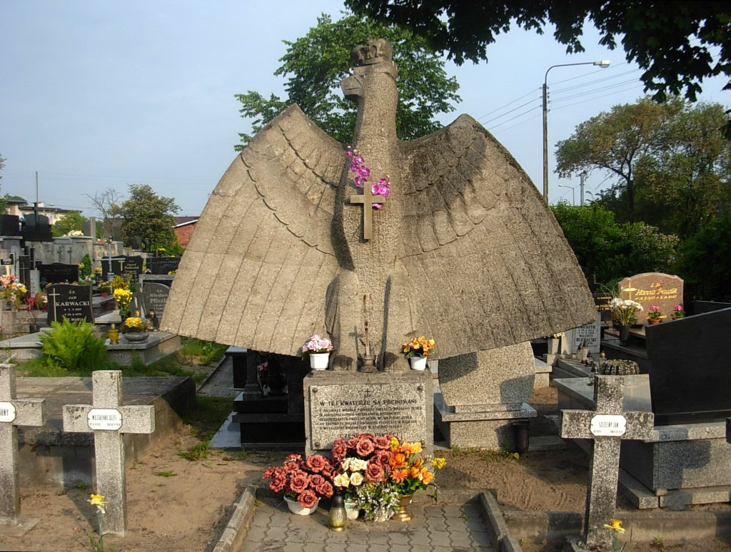 Cmentarz św. Józefa Bydgoszcz, kwatera żołnierska